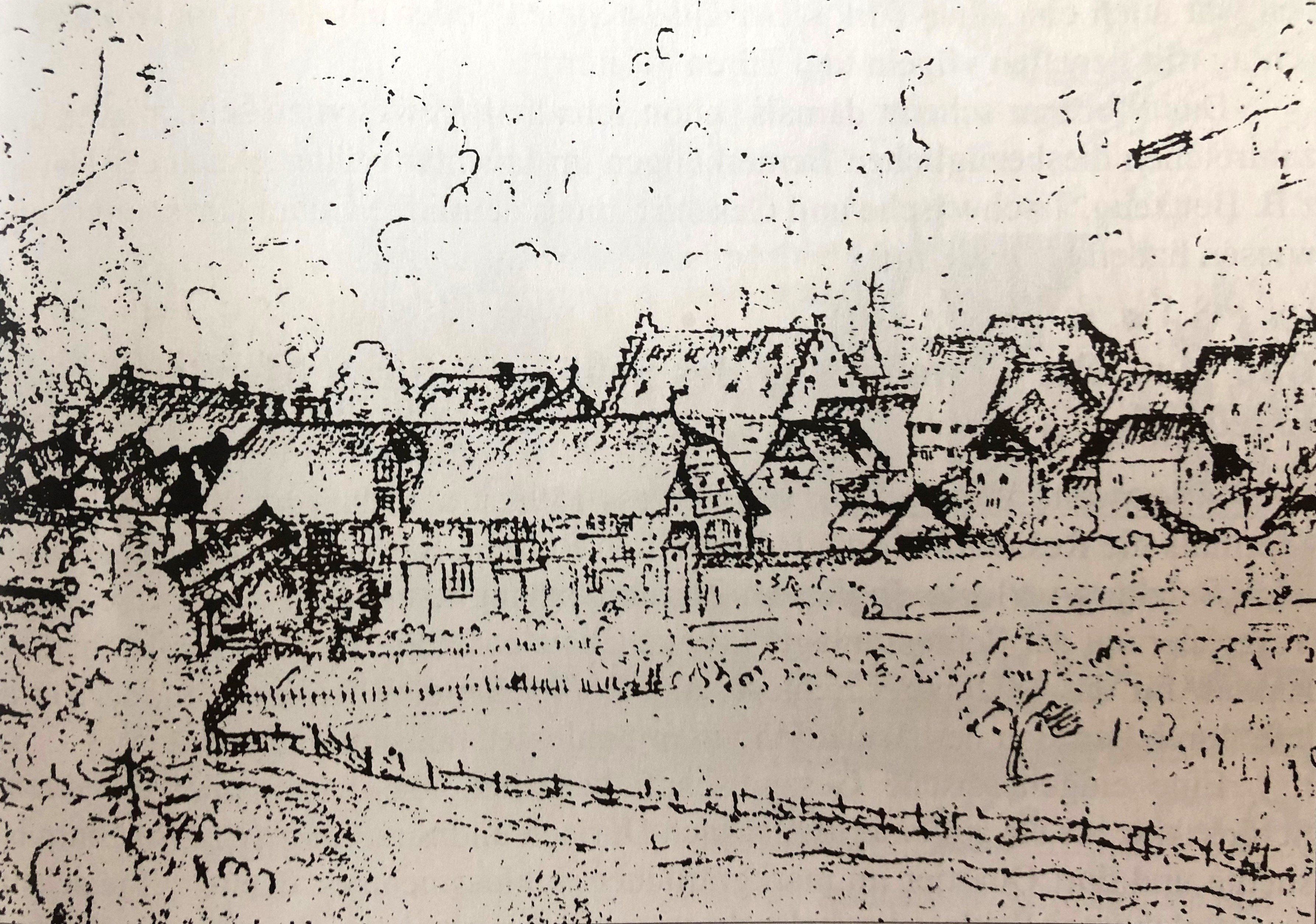 Markgräfliches Residenzschloss, Bau 1, Ausschnitt aus der Stadtansicht Sulzburgs um 1580 von Hans Bock d.Ä.